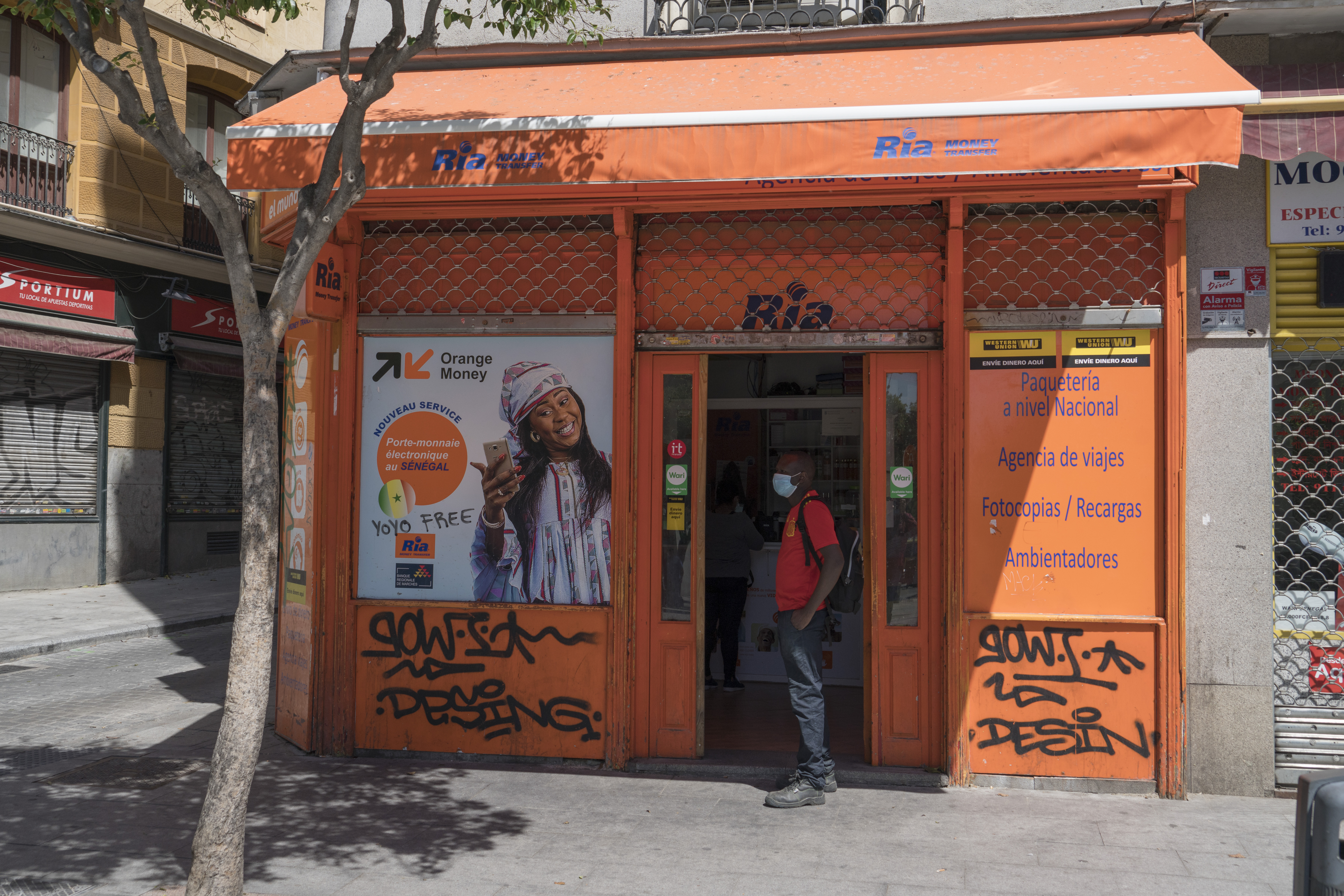 Lavapiés. Madrid. 20 de mayo de 2020